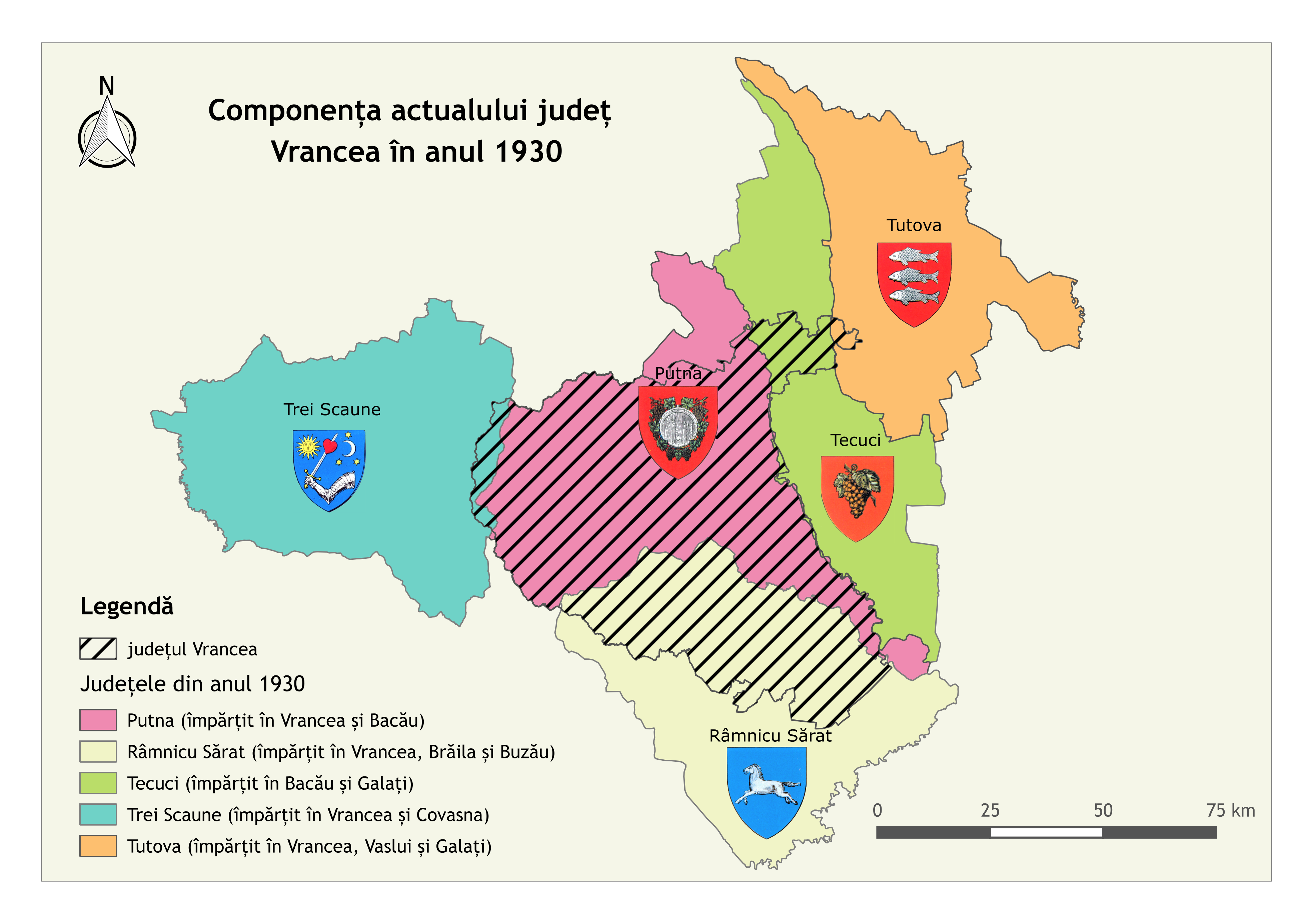 județele vechi din 1930